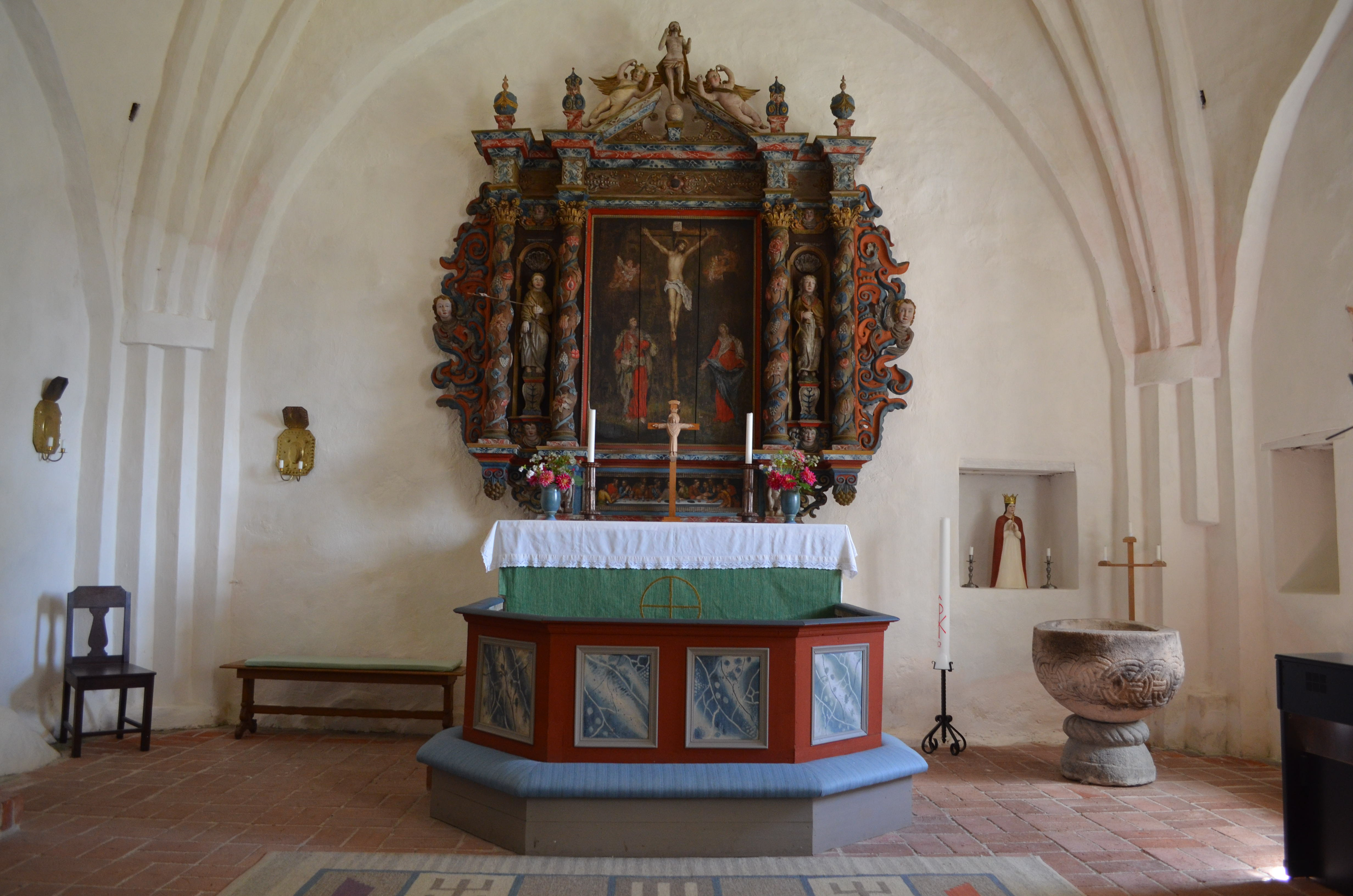 Altaret